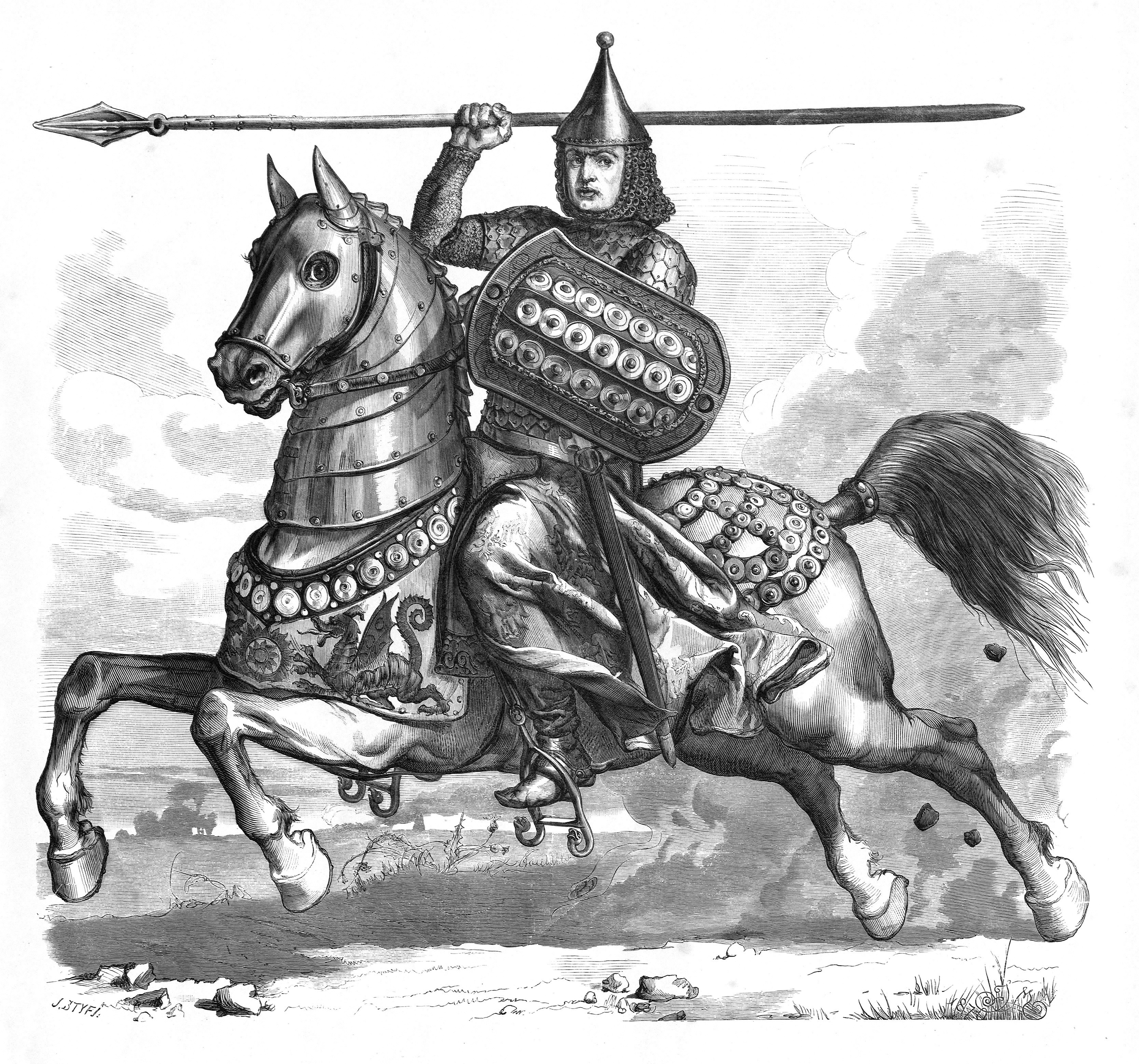 Trojden Książę Czerski Grafika Jan Matejko 1876r